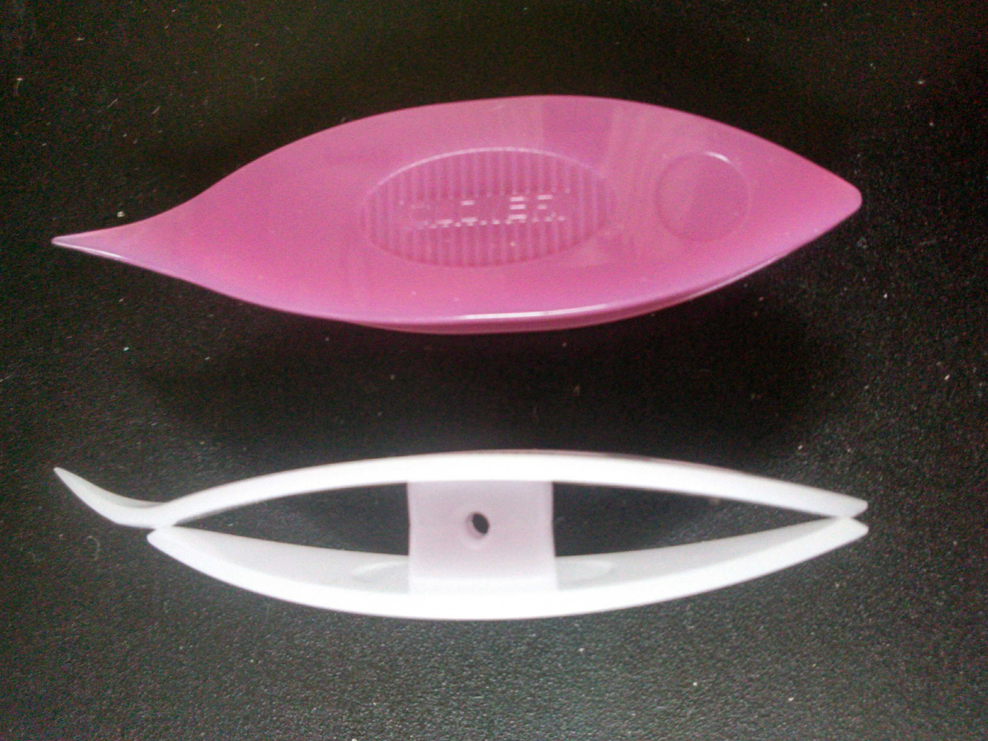 上＝表面、下＝側面。長さは6.5㎝。